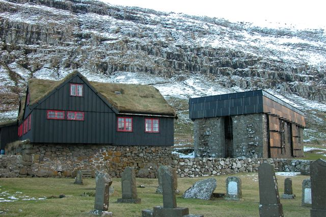 Kirkjubøur